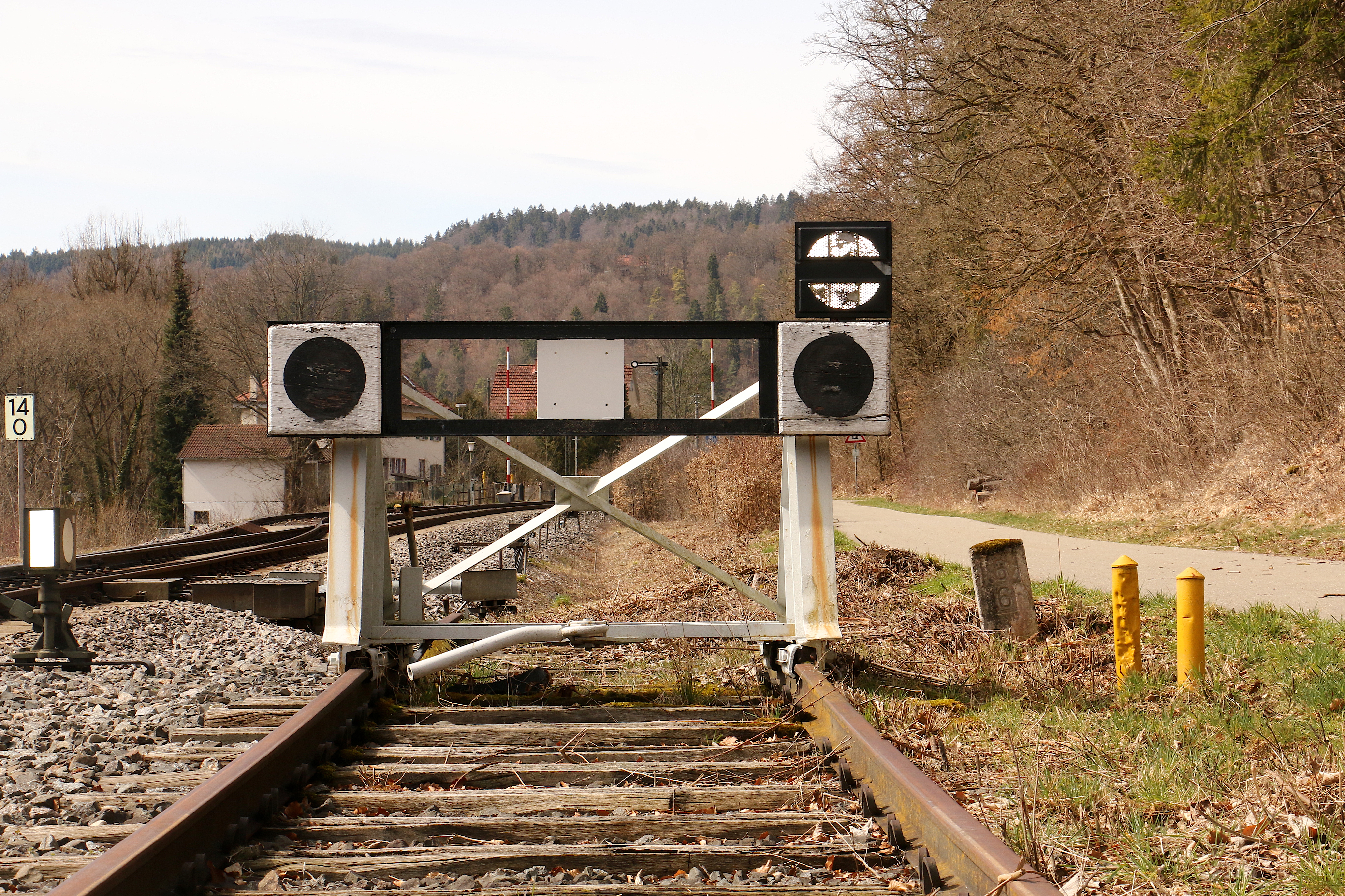 Prellbock im Bahnhof Fridingen (2018)